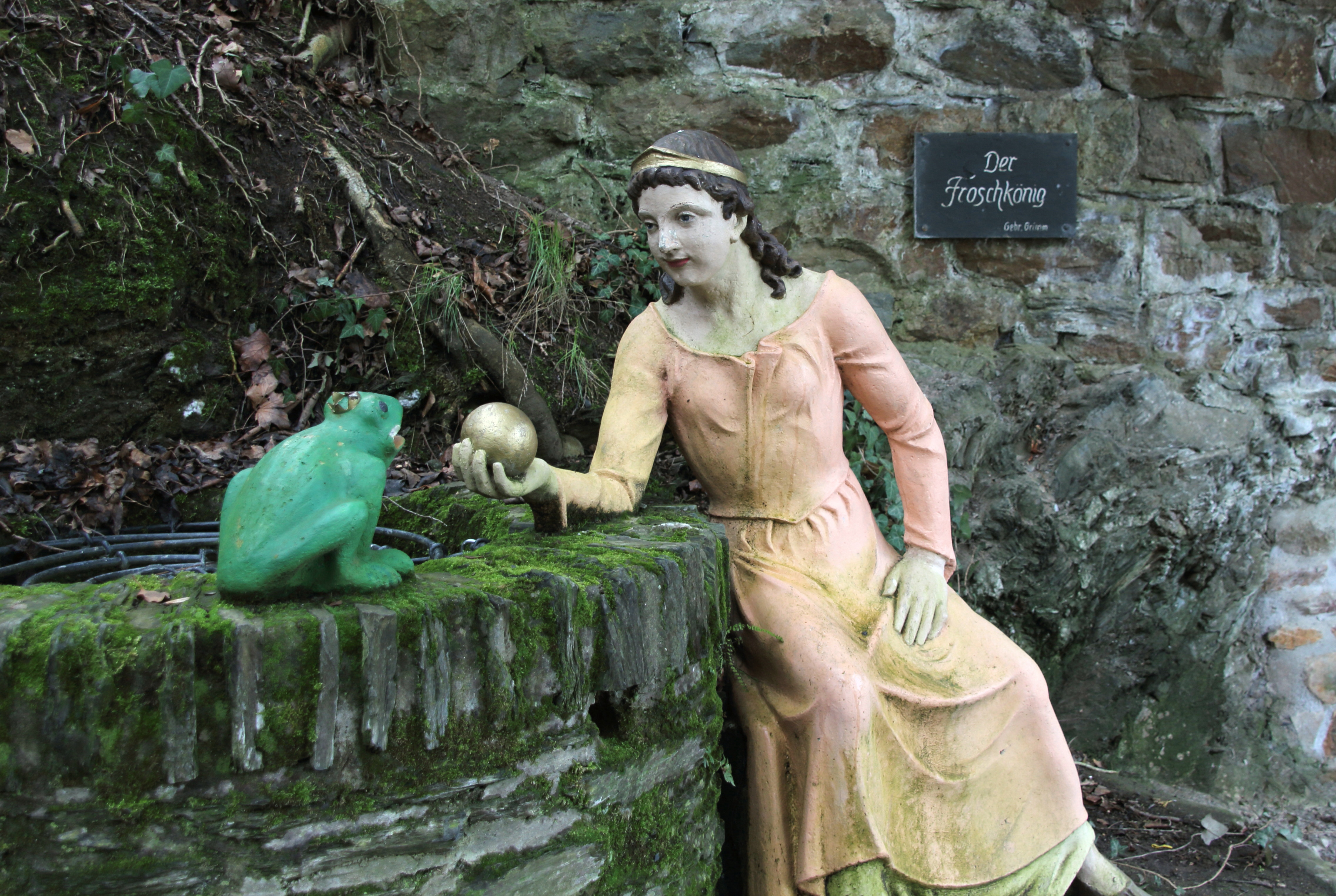 Ehemalige Märchenhain-Figuren "Der Froschkönig oder der eiserne Heinrich" des Bildhauers Ernst Heilmann (1877-1969). Niederheimbach, Kreis Mainz-Bingen